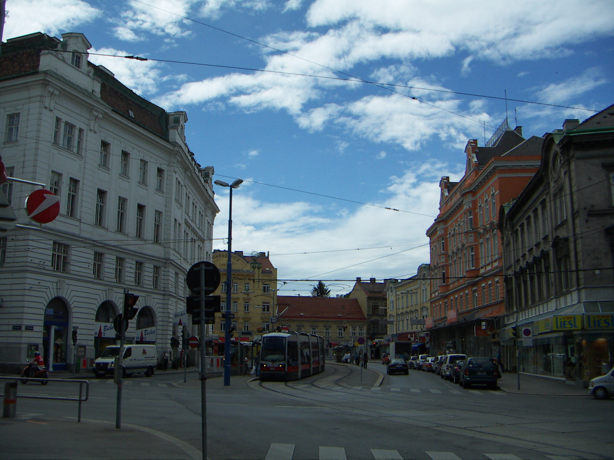 links: Bezirksamt Floridsdorf, davor: Ehemaliger Floridsdorfer Markt